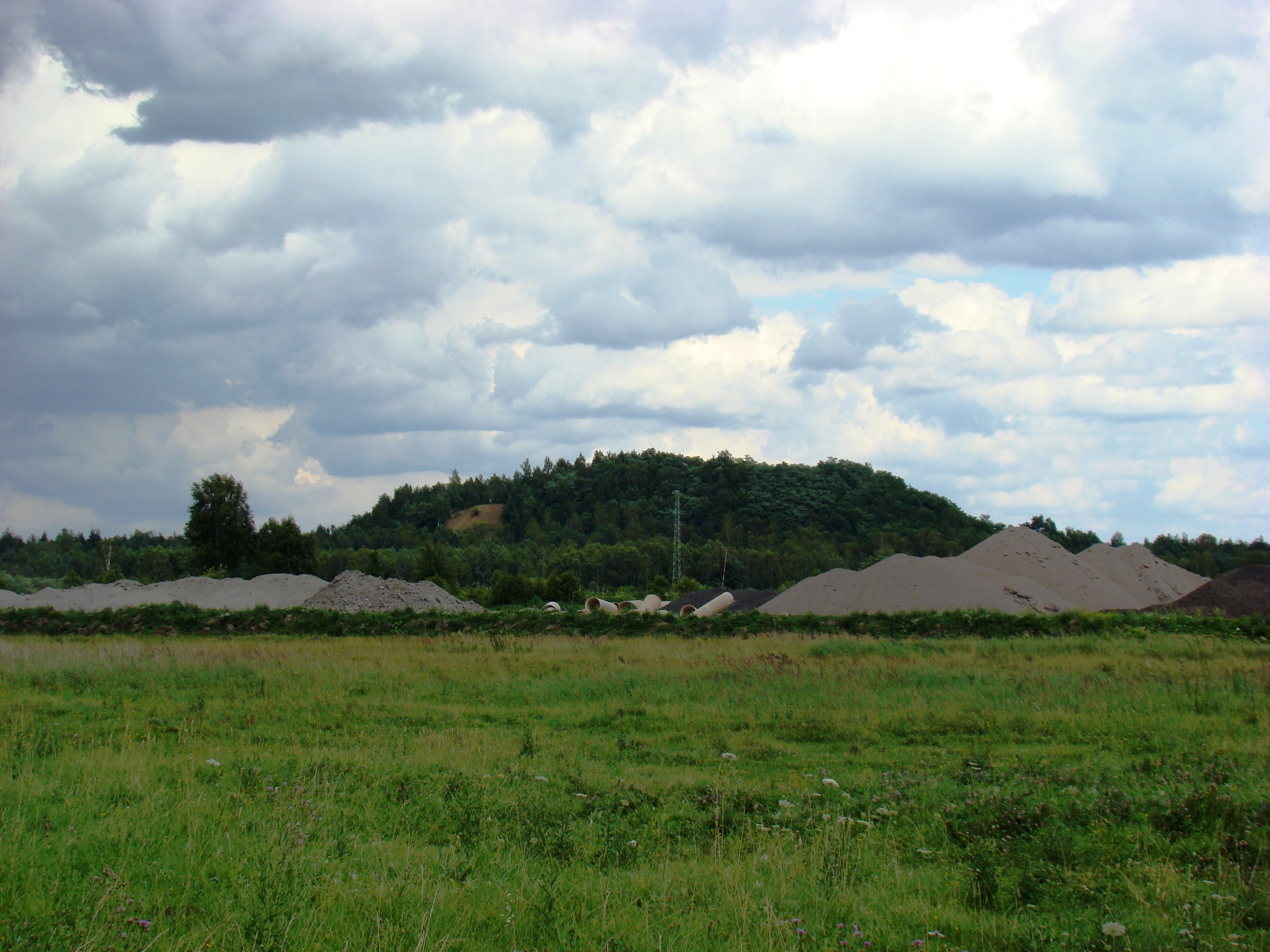 hałda pokopalniana rud żelaza w okolicach wsi Osiny, gmina Poraj.